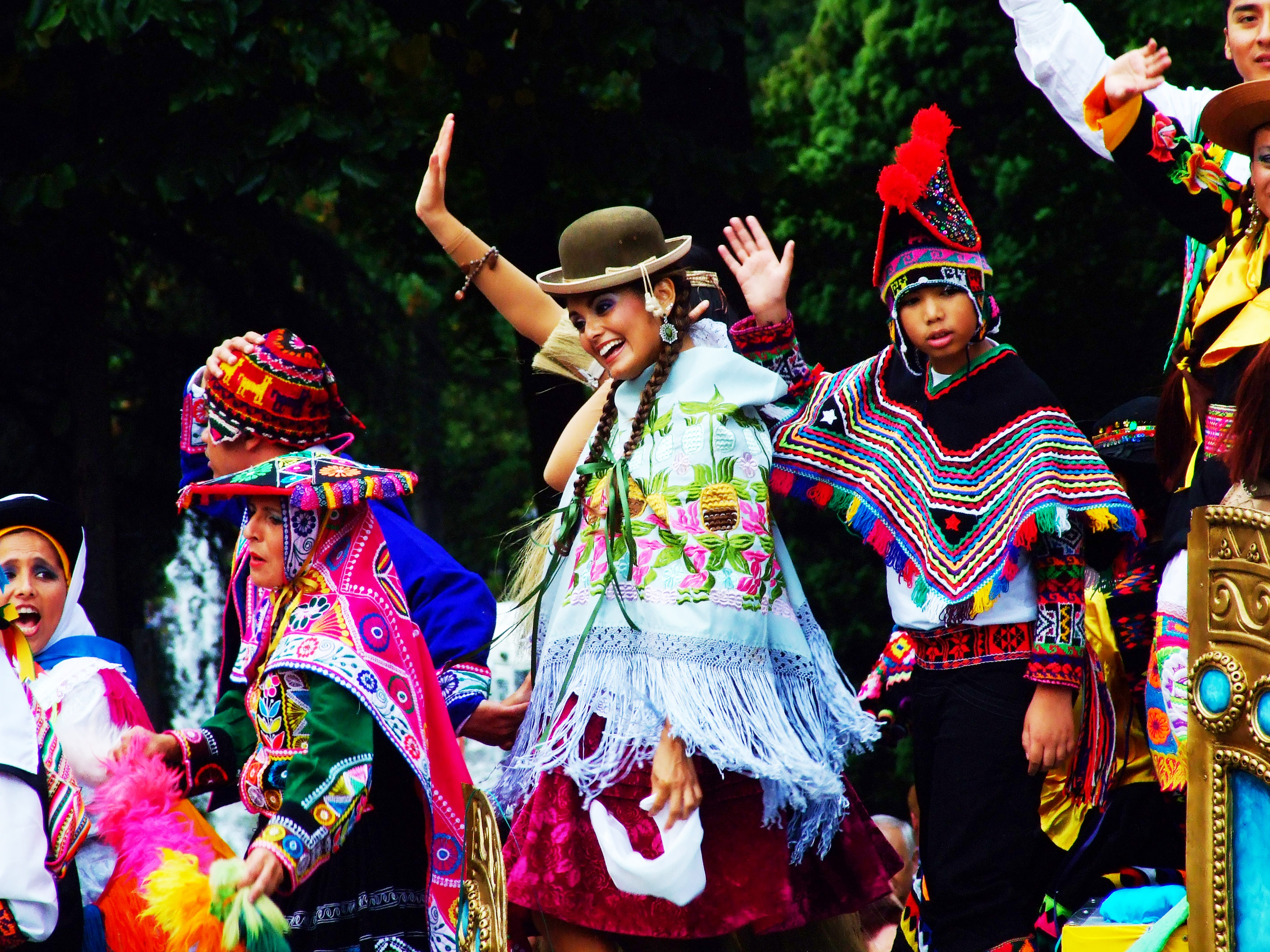 Desfile del día de América en Asturias (en Oviedo), ésta es la carroza de Perú, pasando por la calle Santa Cruz, junto al Parque San Francisco